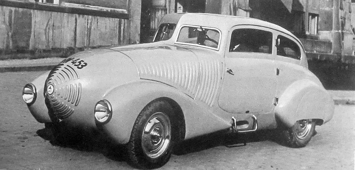 Sportovní vůz Supersport Wikov - továrny na stroje Wichterle a Kovářík v Prostějově